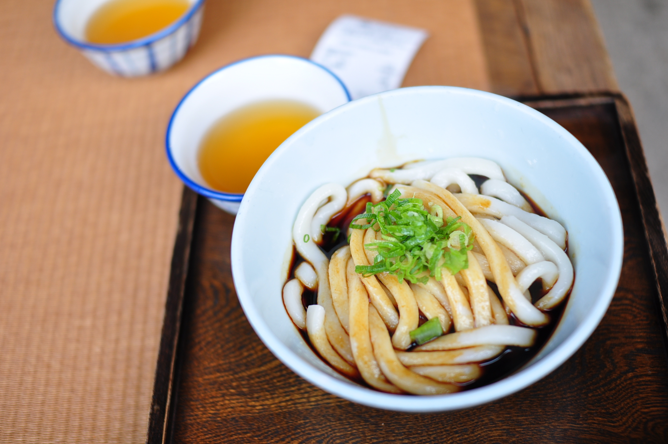 伊勢うどん（三重県伊勢市宇治中之切町52、おかげ横丁にある伊勢うどん店「ふくすけ」）